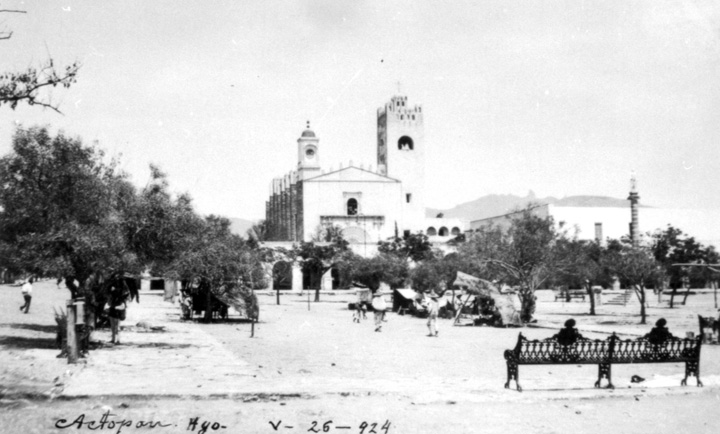 ORIGEN LUGAR DE ORIGEN Actopan, Hidalgo, México FECHA DE CREACIÓN 1924-05-26 GÉNERO Fotografía TIPO DE RECURSO Imagen fija DESCRIPCIÓN FÍSICA FORMA Rayaduras Dobladuras Hasta 35 mm Negativo de película de seguridad IDIOMA Español UBICACIÓN SINAFO- Fototeca Nacional del INAH. Casasola S/N, Exconvento de San Francisco,. Col. Centro C.P.42050 Pachuca, Hgo. México.